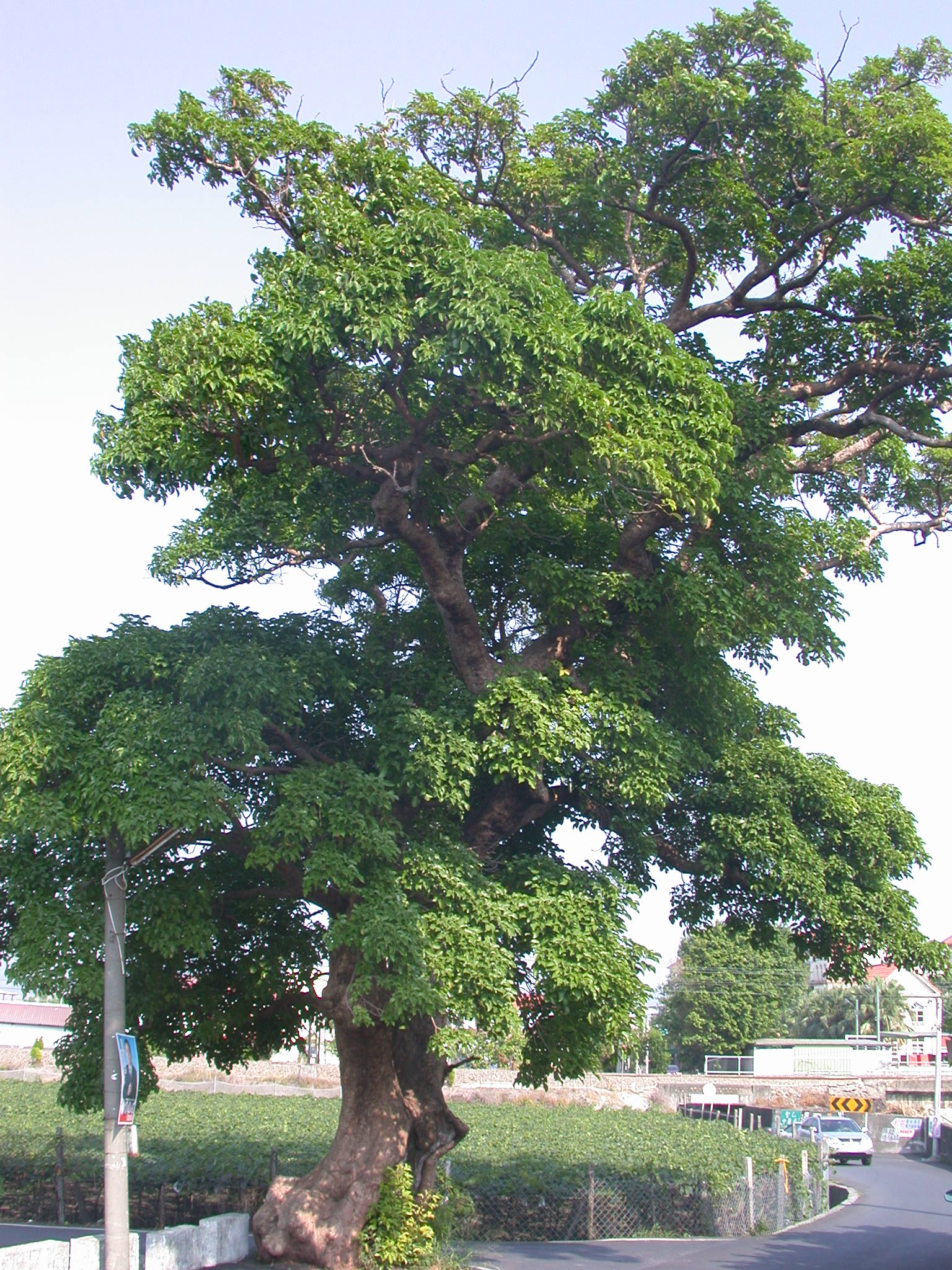 Bân-lâm-gú: 彰化縣大村鄉過溝村的茄苳樹。